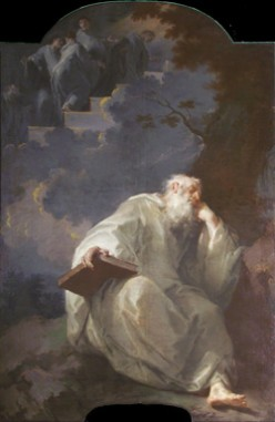 S. Romuald's dream